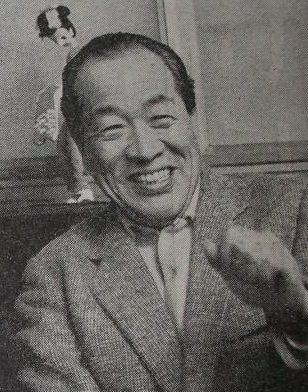 藤林甲（当時満53歳） 『週刊平凡』第3巻第37号所収、平凡出版、1961年9月発行